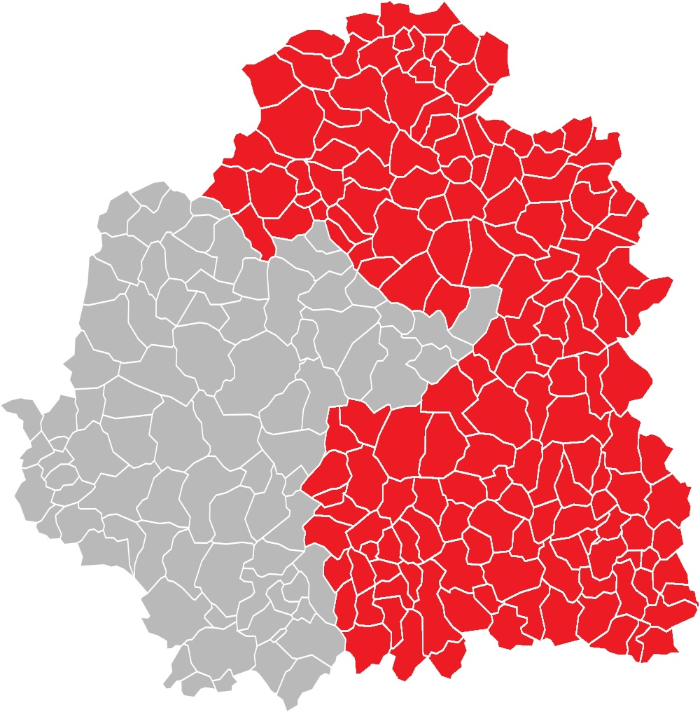 Carte des communes de l'Indre (36) : La deuxième circonscription à compter de 2012.